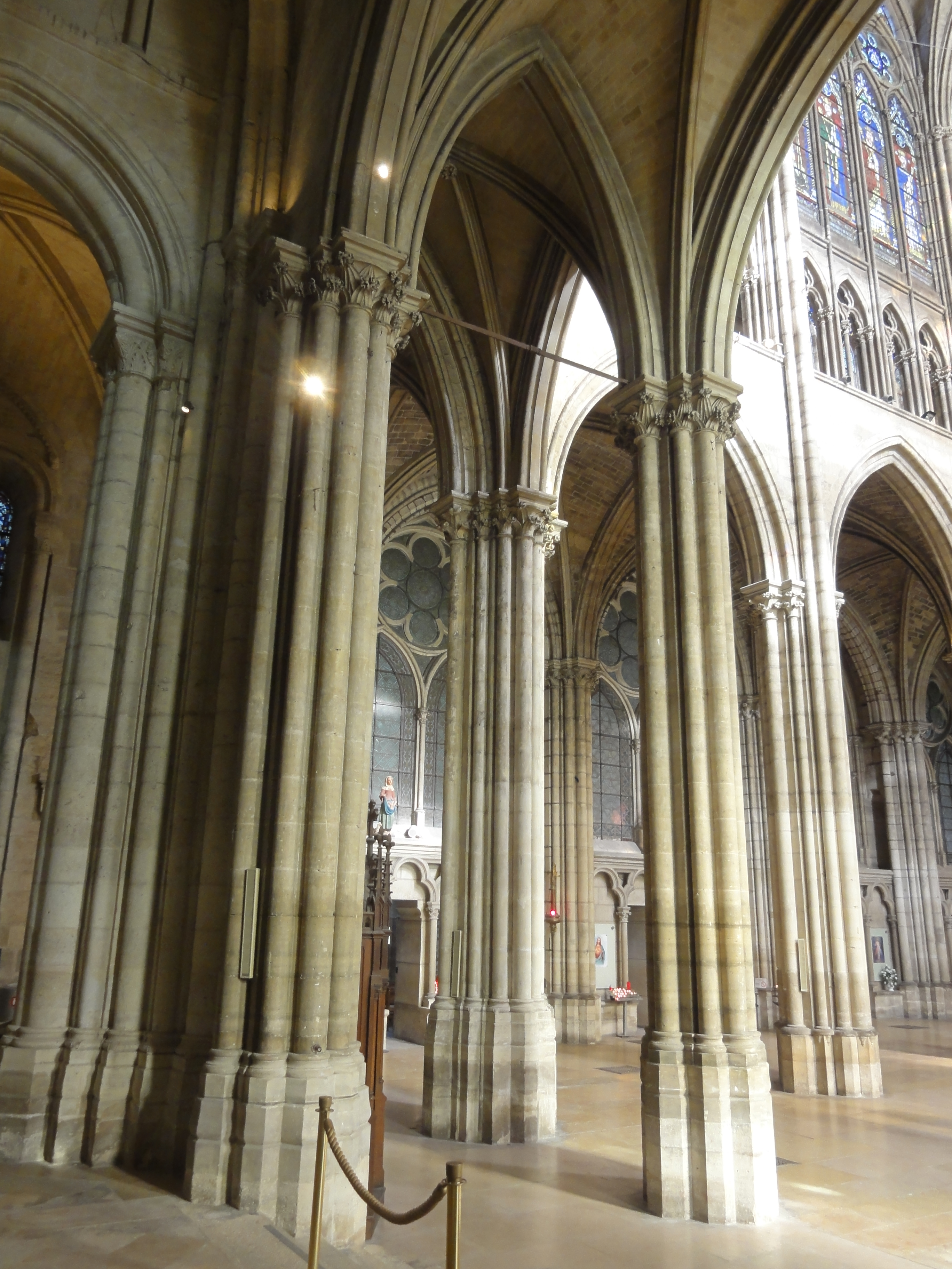 Avant-nef, vue sous la tribune d'orgue.